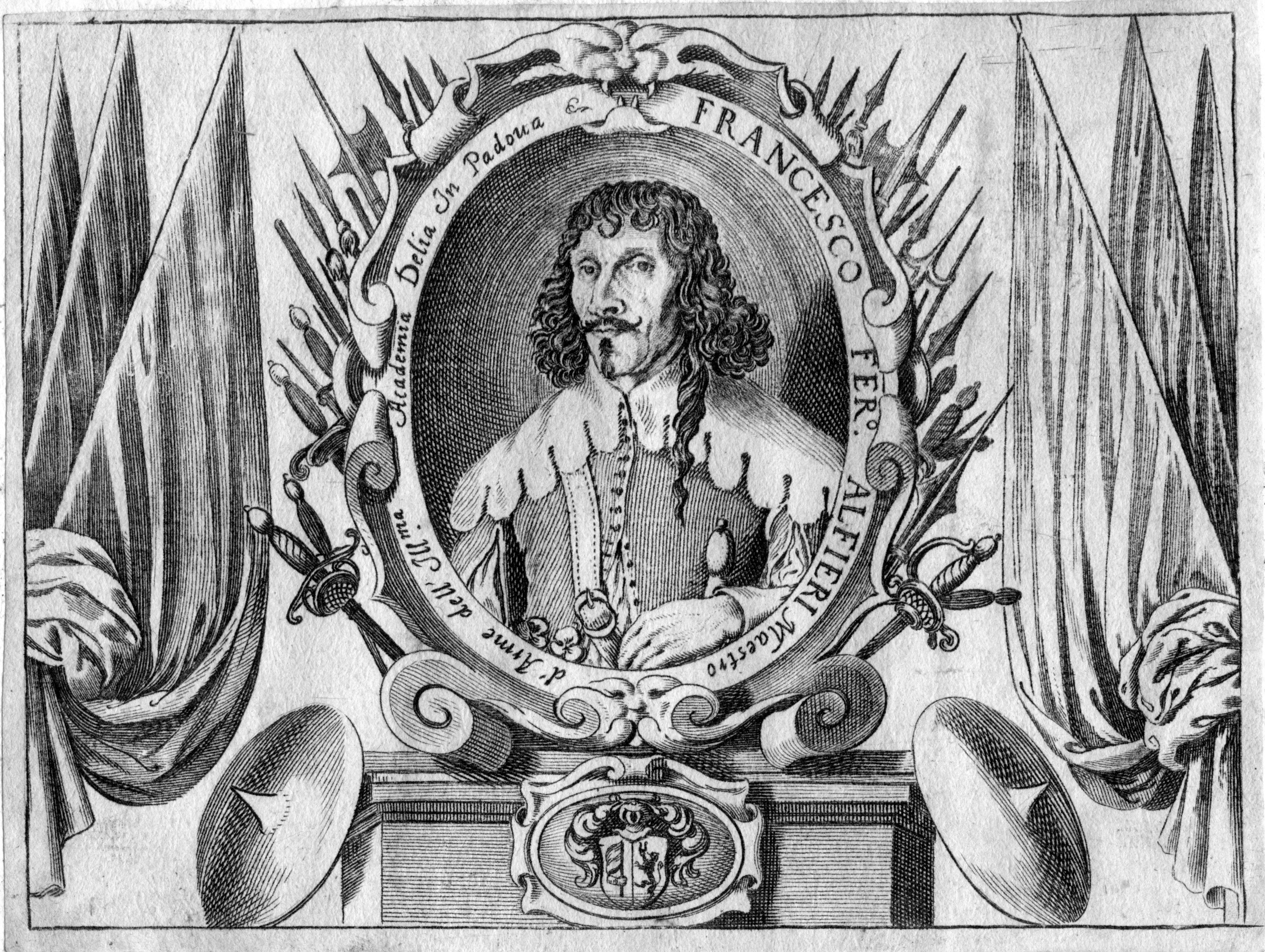 Portrait gravé